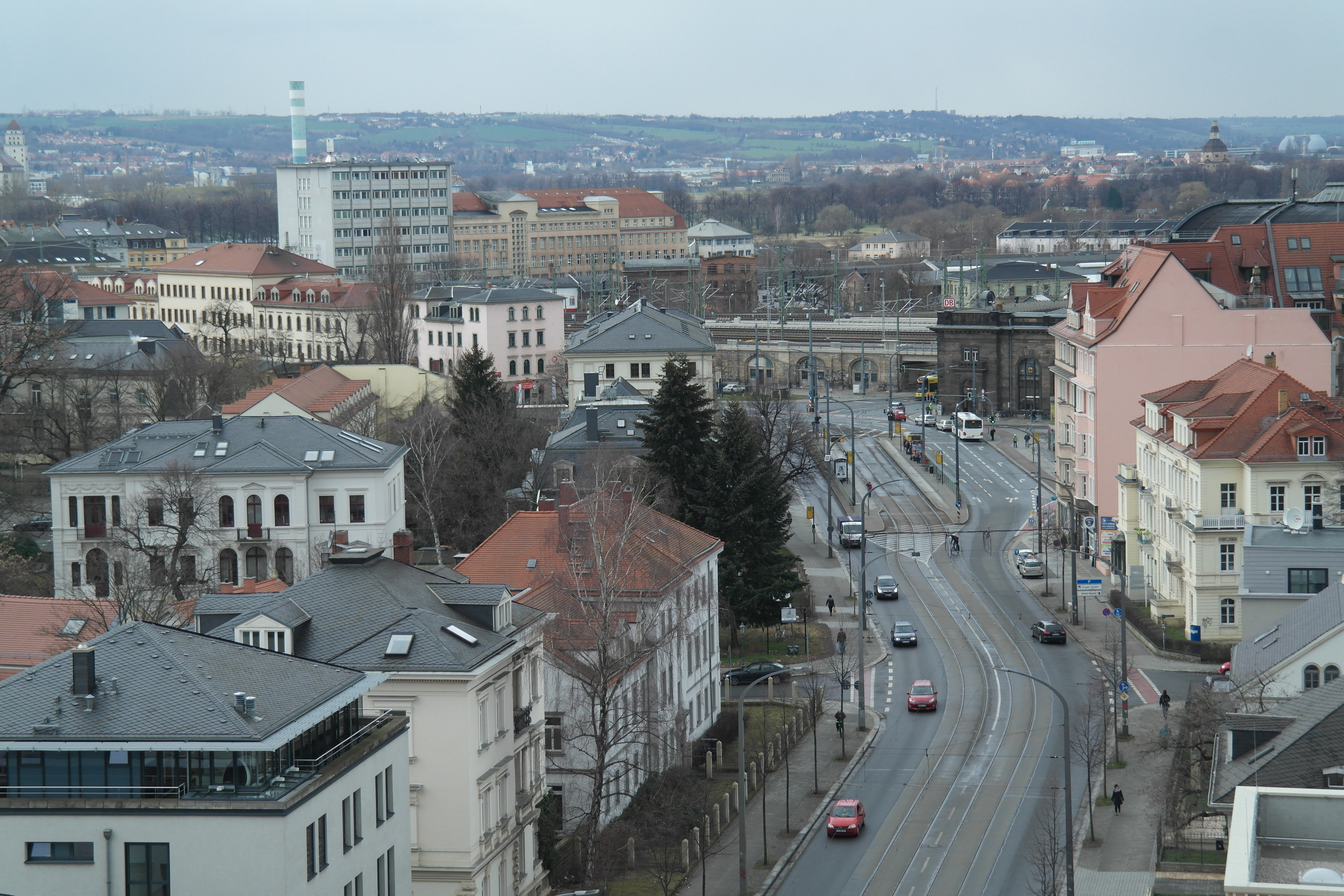 Dresden-Hochhaus am Albertplatz. Tag der offenen Tür - Blick von der 10.Etage Richtung Neustädter Bahnhof und Antonstrasse (B 6)